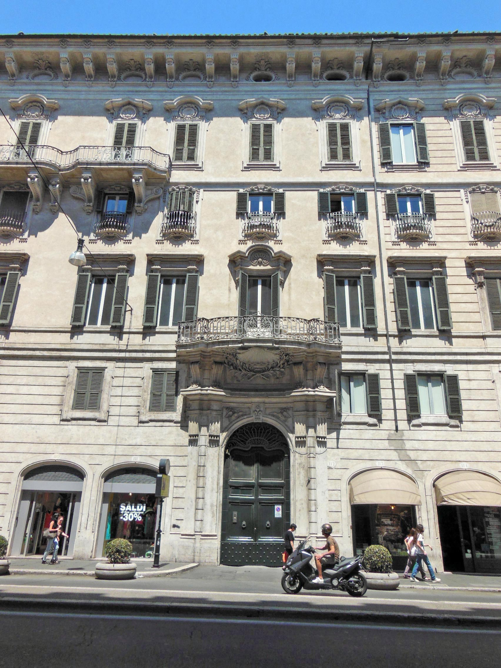 Roma, Palazzo Doria Pamphilj, settore centrale della facciata su via del Plebiscito